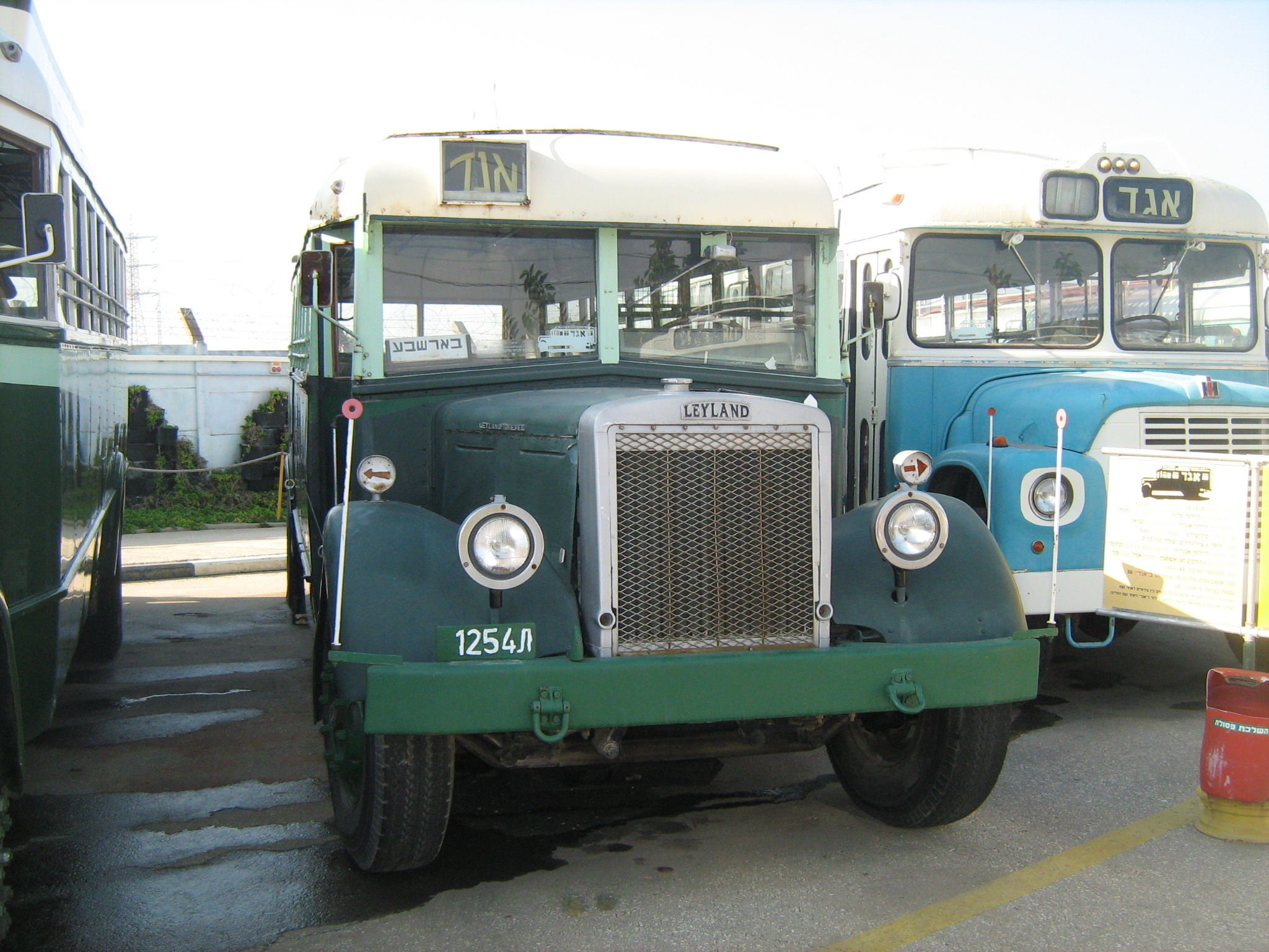 מוזיאון אגד בחולון